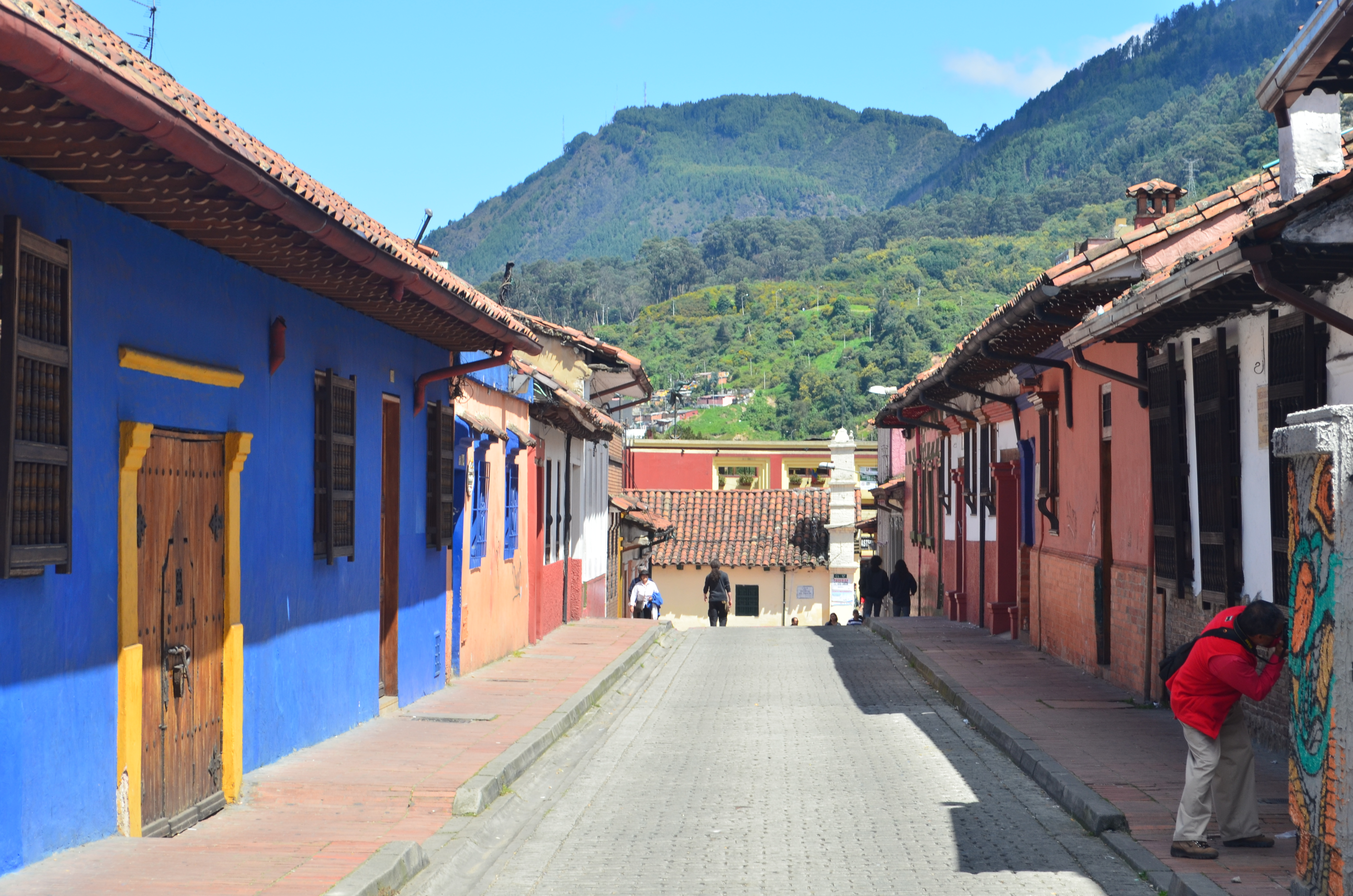 Sector Antiguo de la Ciudad de Bogotá